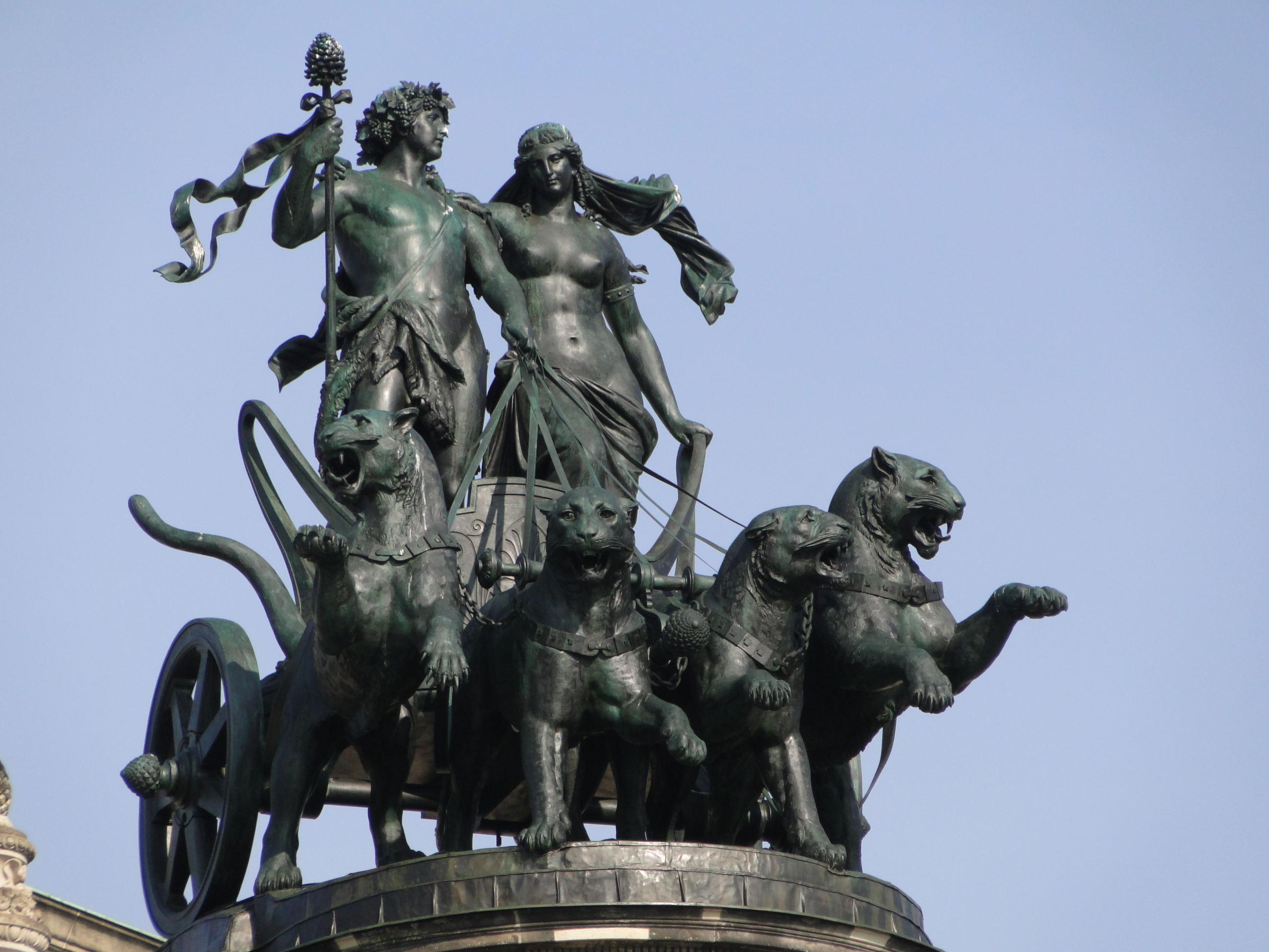 Kulturdenkmal Theaterplatz 2 Dresden Semperoper Pantherquadriga Dionysos Ariadne von Johannes Schilling